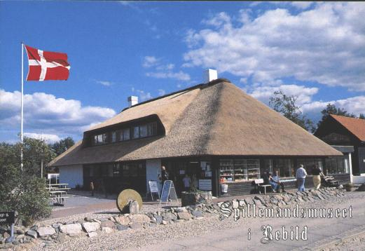 Spillemandsmuseet